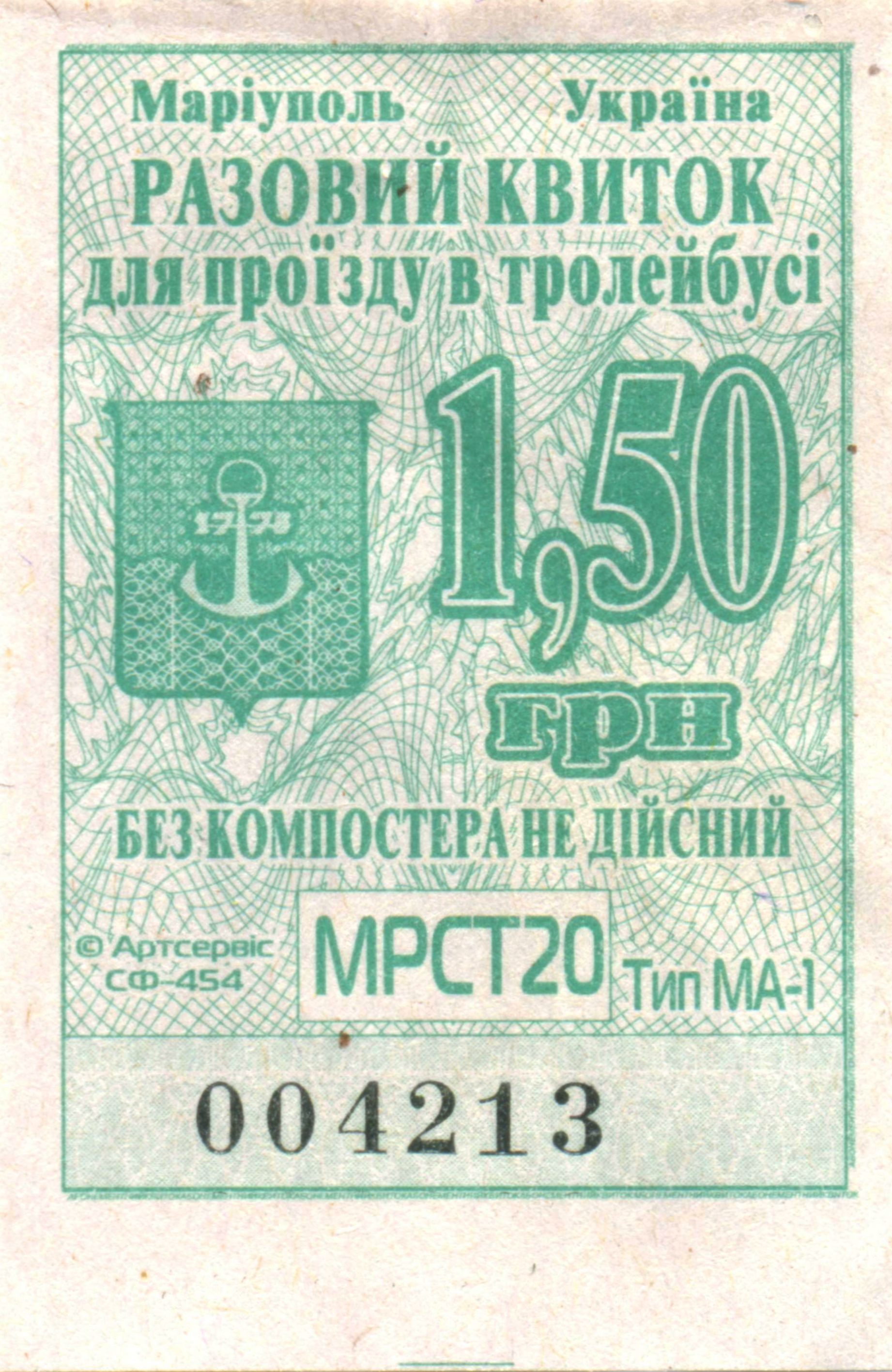 троллейбусный билет в Мариуполе